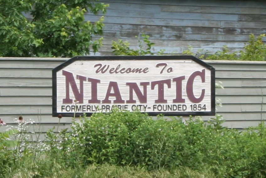 Welcome_to_Niantic_Illinois sign